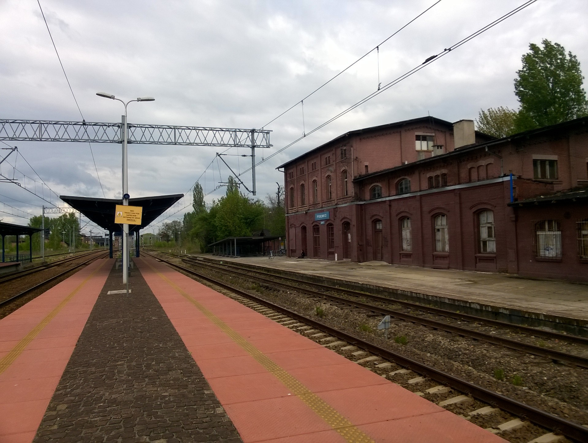 Peron 2 stacji Pyskowice